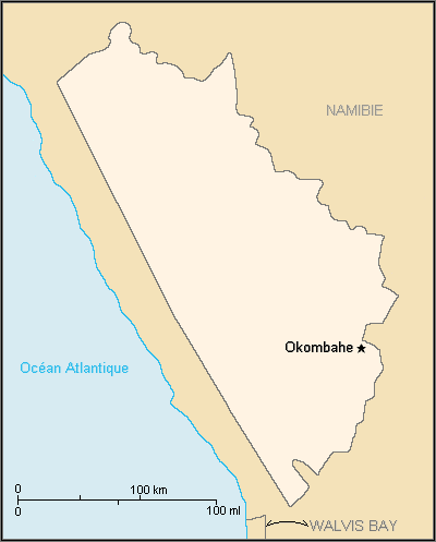 Description:Carte du Damaraland Auteur:Rémih